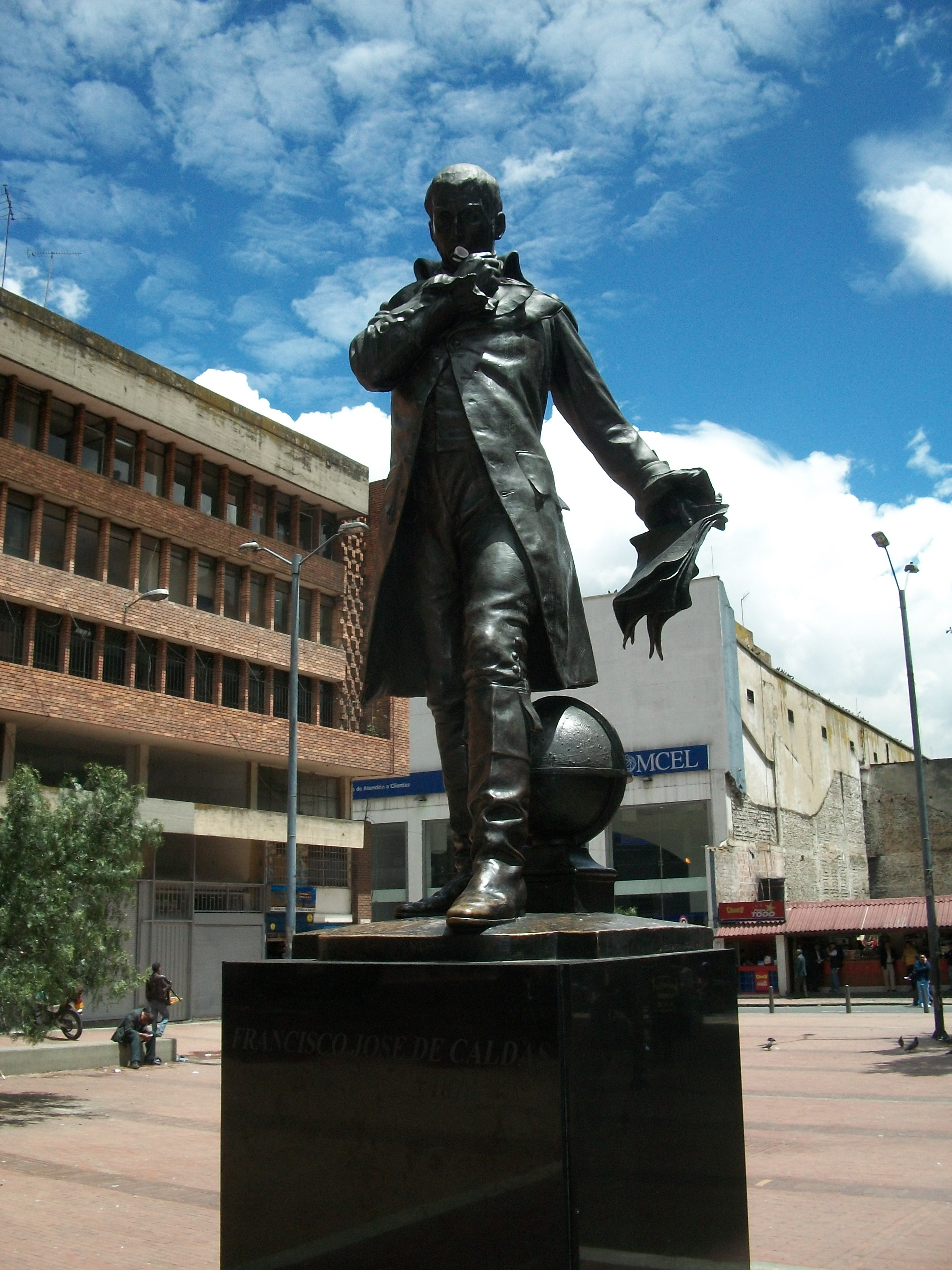 Estatua de Franciso José de Caldas en la Plaza de las Nieves de Bogotá.